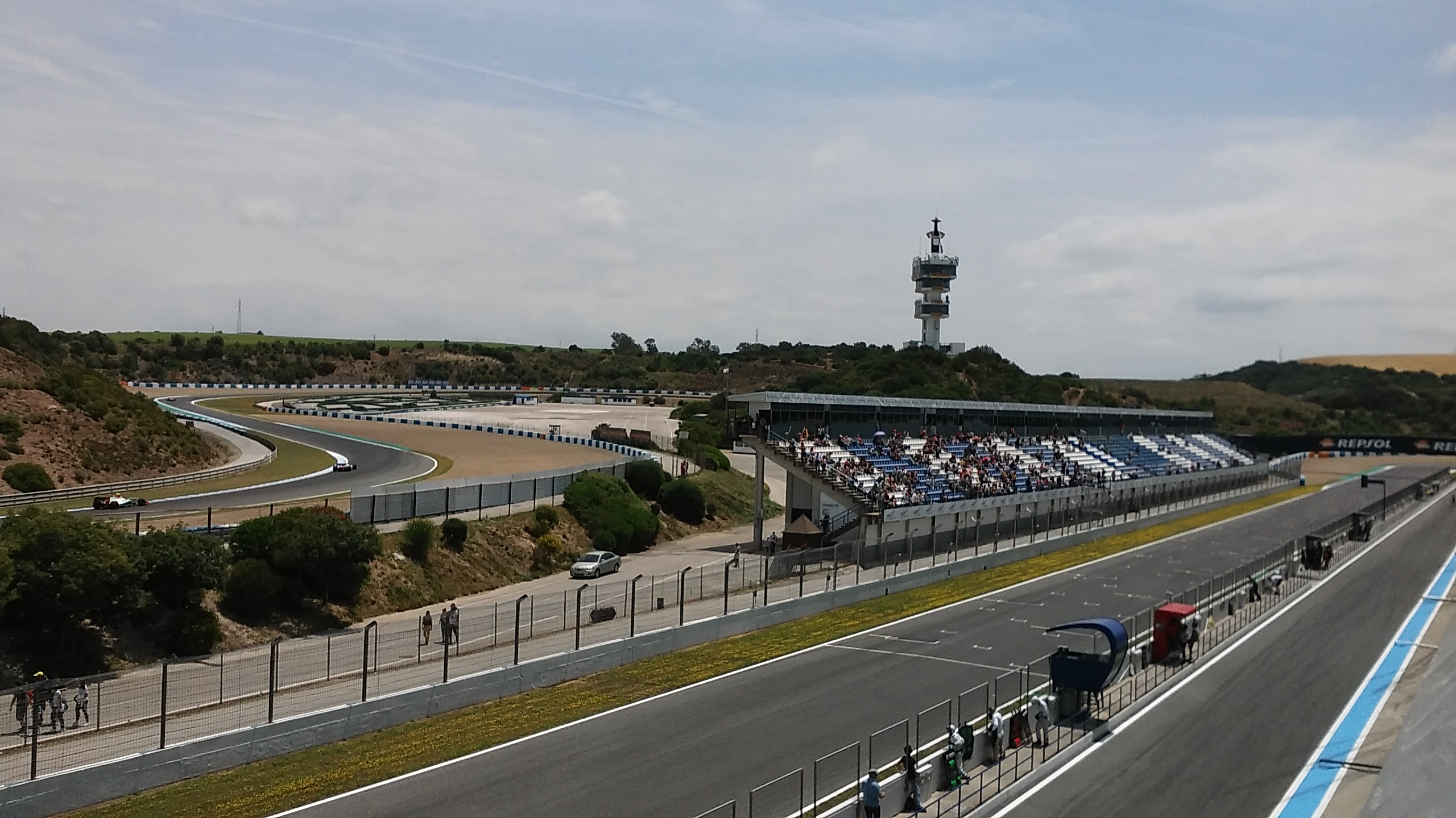 World Series Fórmula V8 3.5 en el Circuito Permanente de Jerez